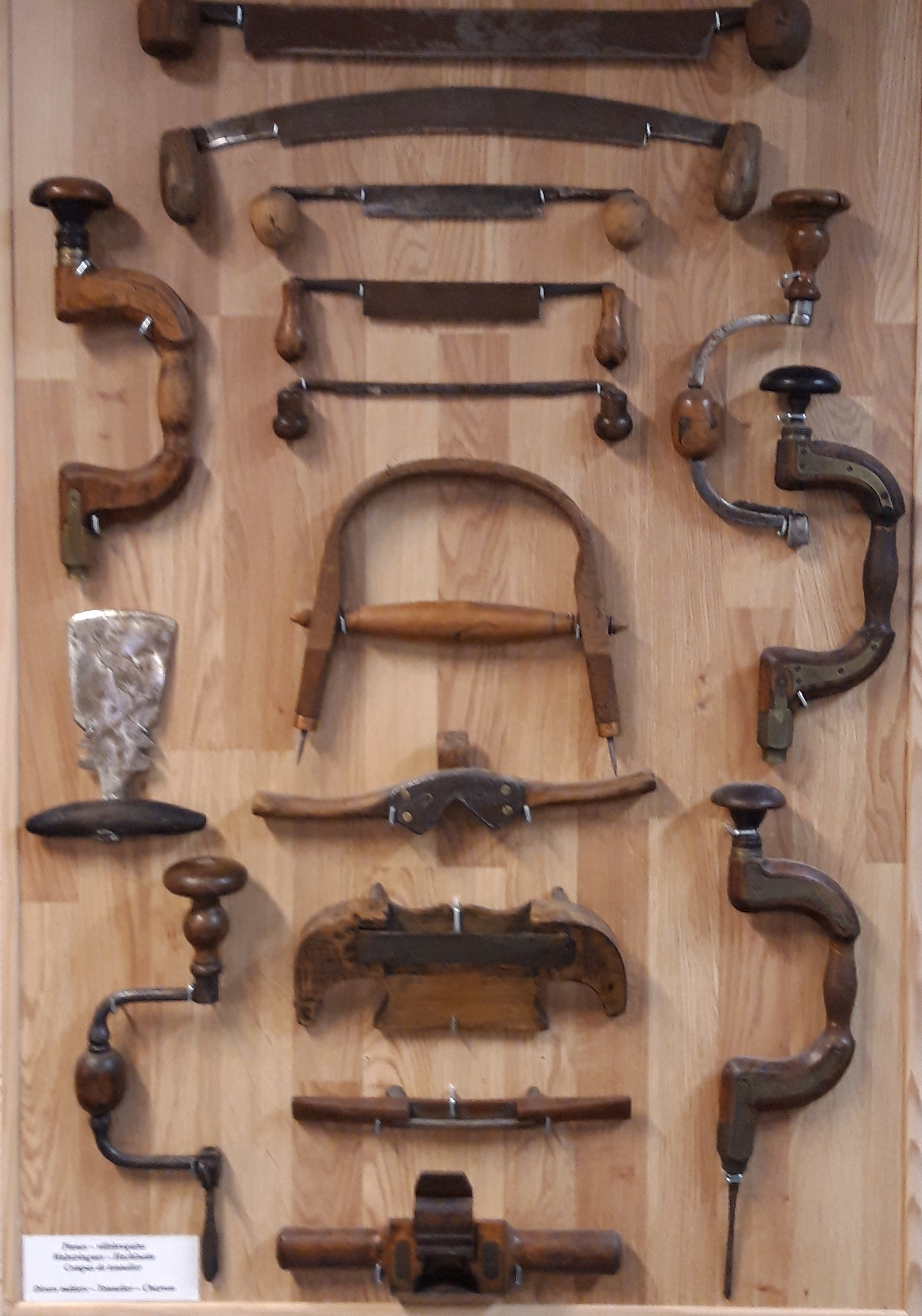 Collection de vilebrequins, musée des métiers du bois, Labaroche (Haut-Rhin)